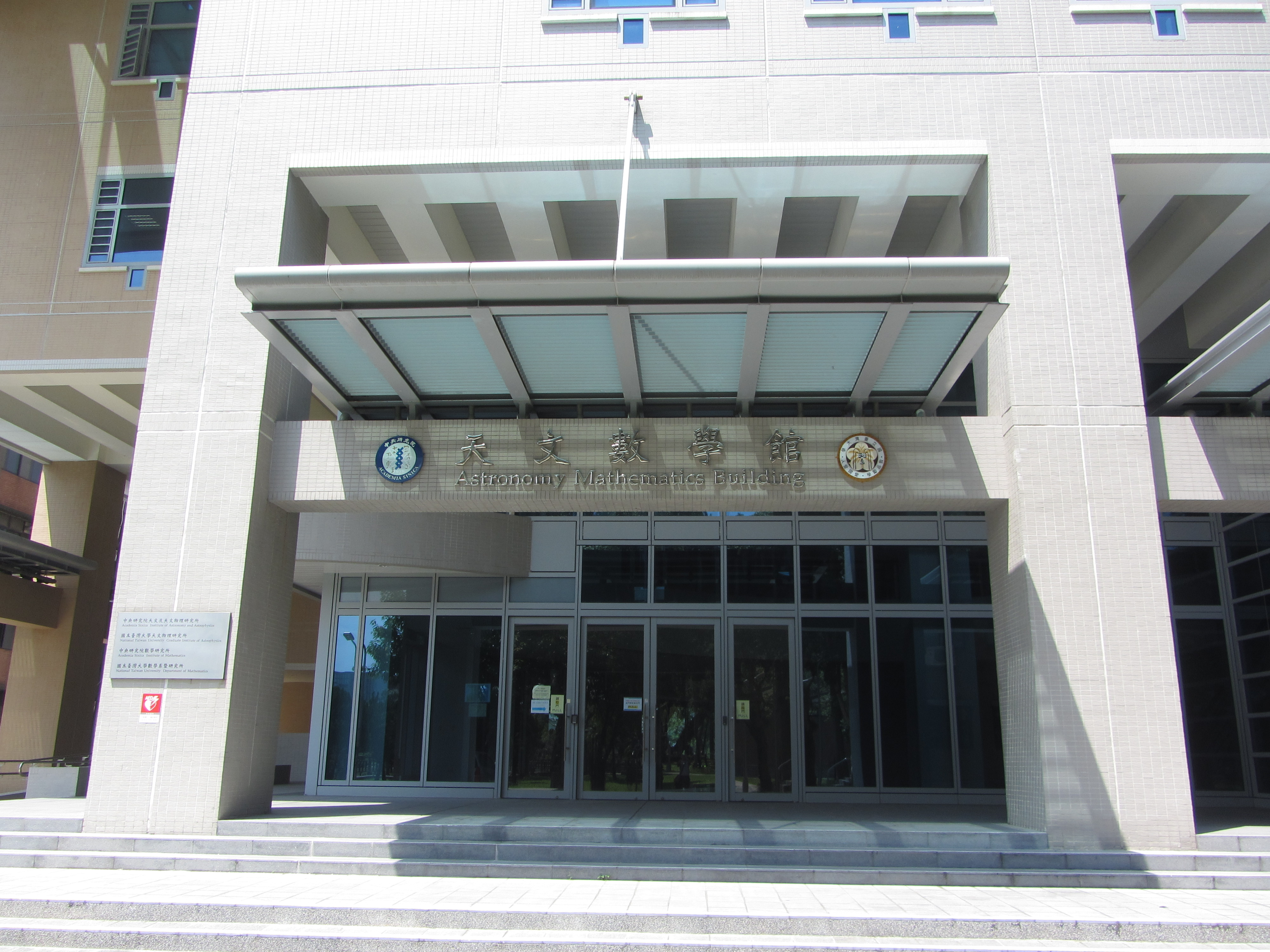 國立臺灣大學天文數學館入口